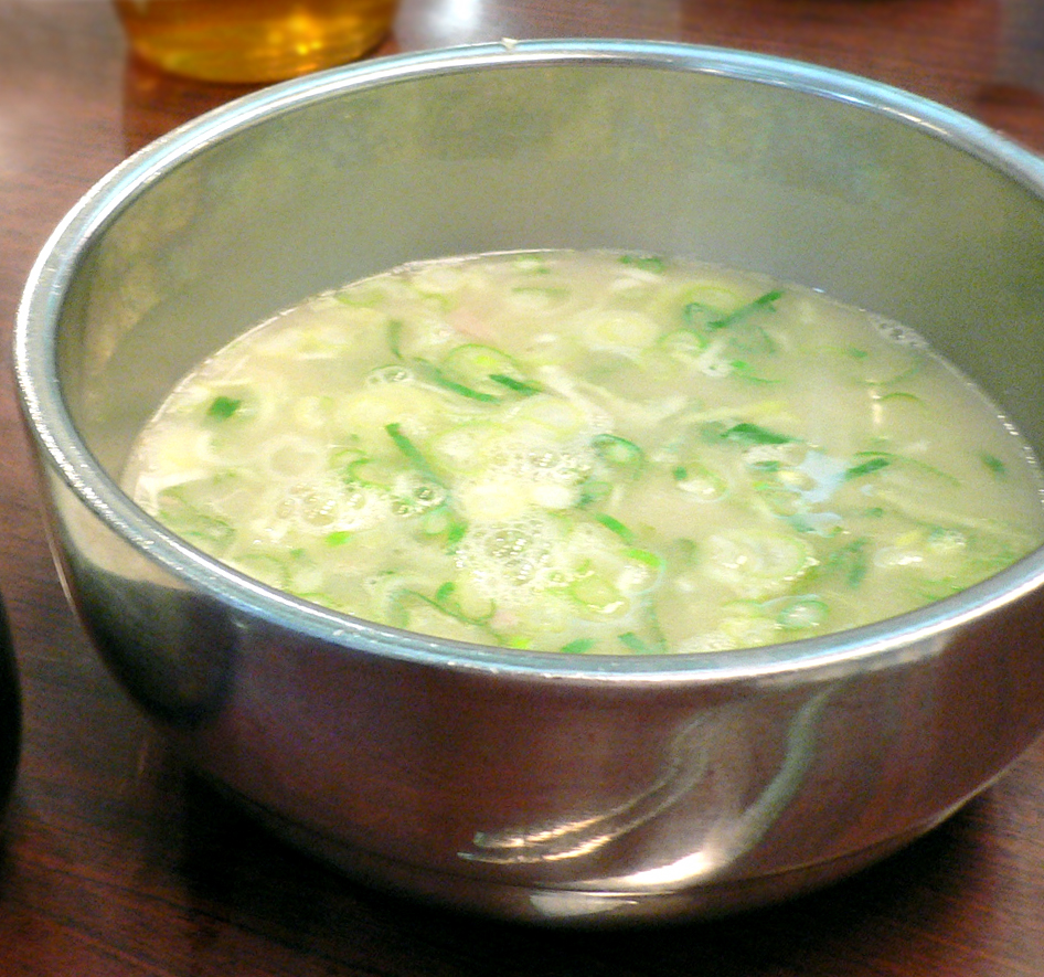 설렁탕